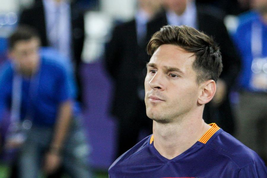 Матч за Суперкубок УЄФА 2015 року у Тбілісі. Грузія